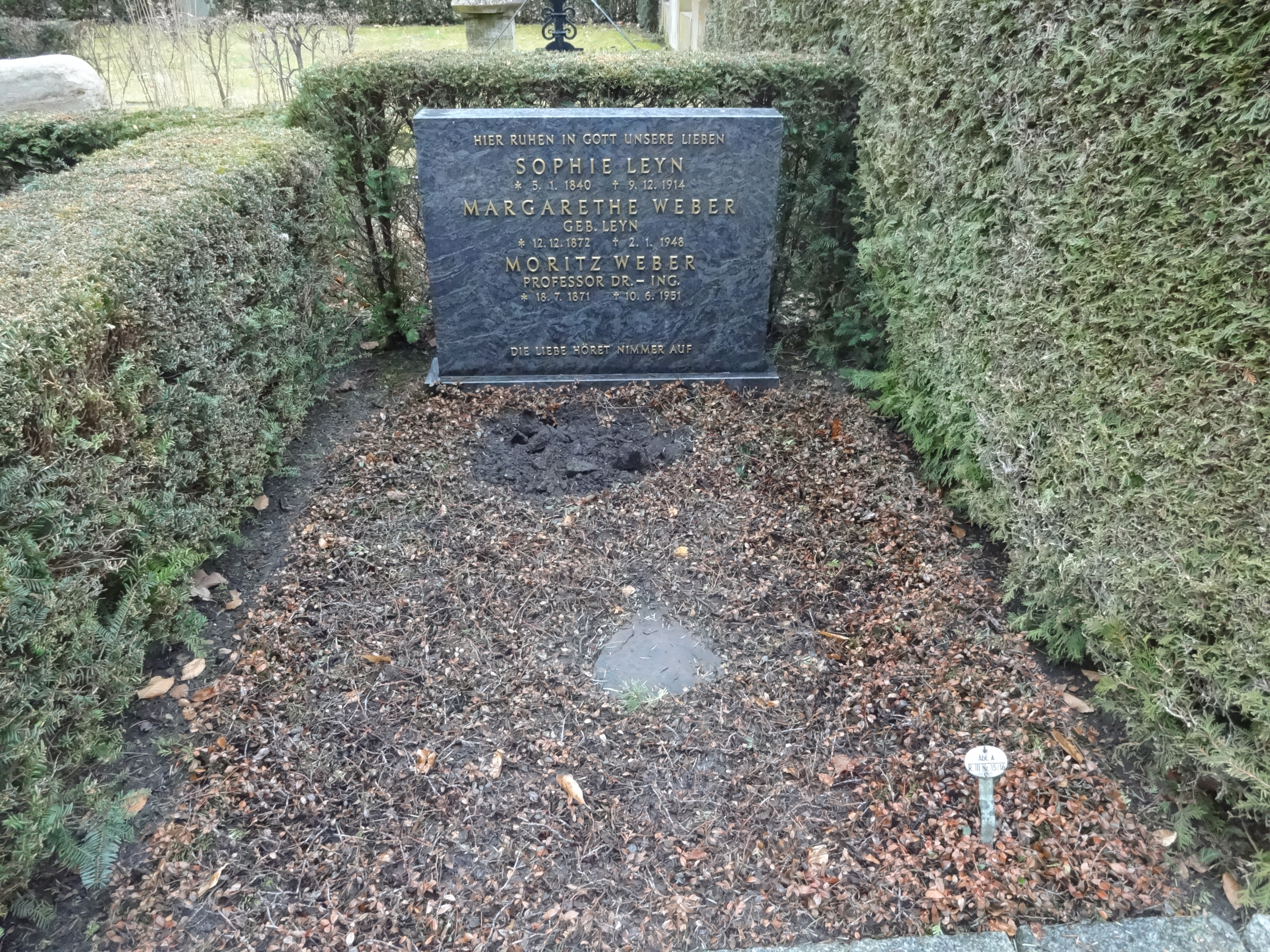 Grab von Prof. Moritz Weber auf dem Evangelischen Kirchhof Nikolassee in Berlin